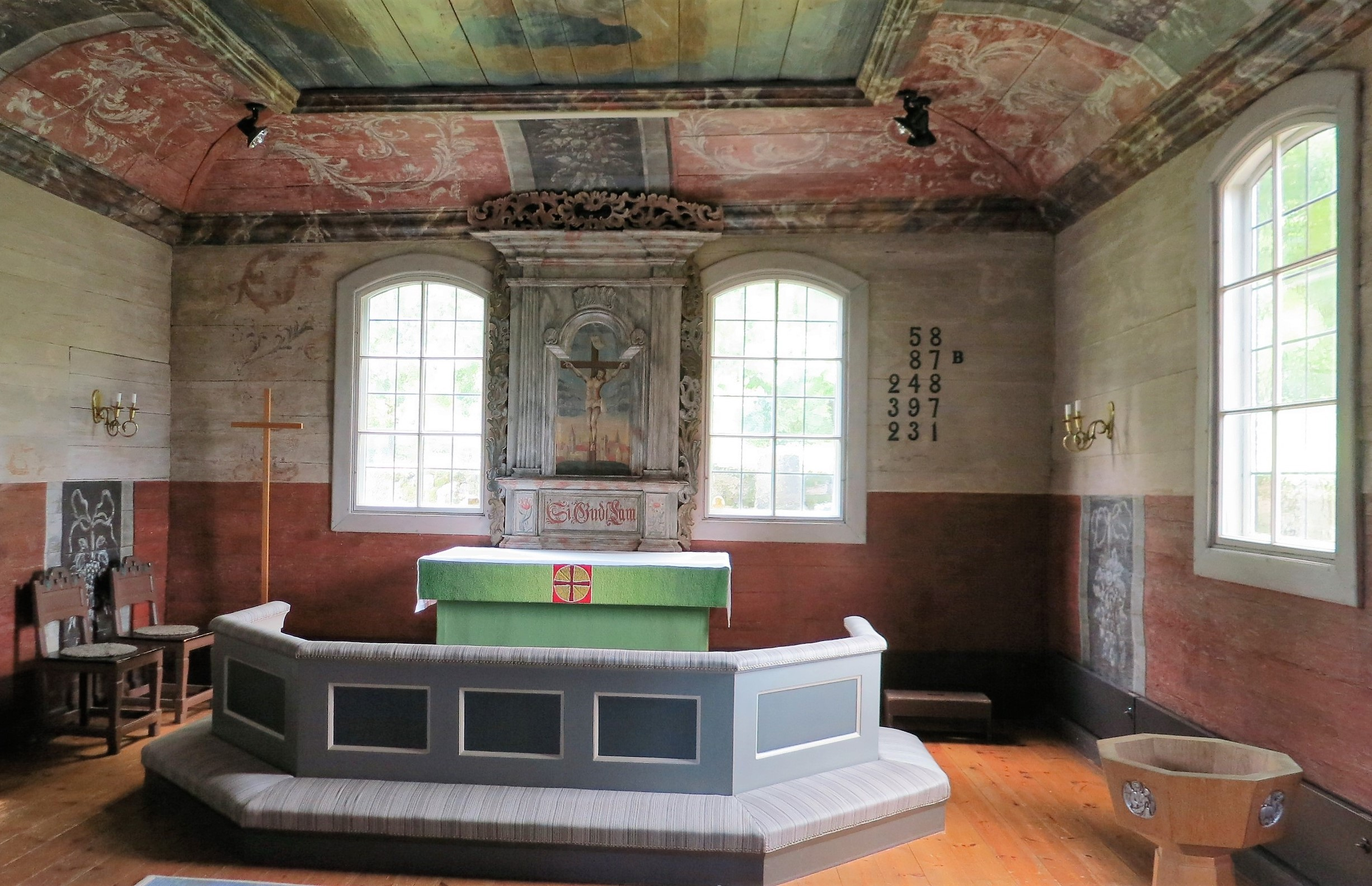 Norra Hestra kyrka, Växjö stift, Småland